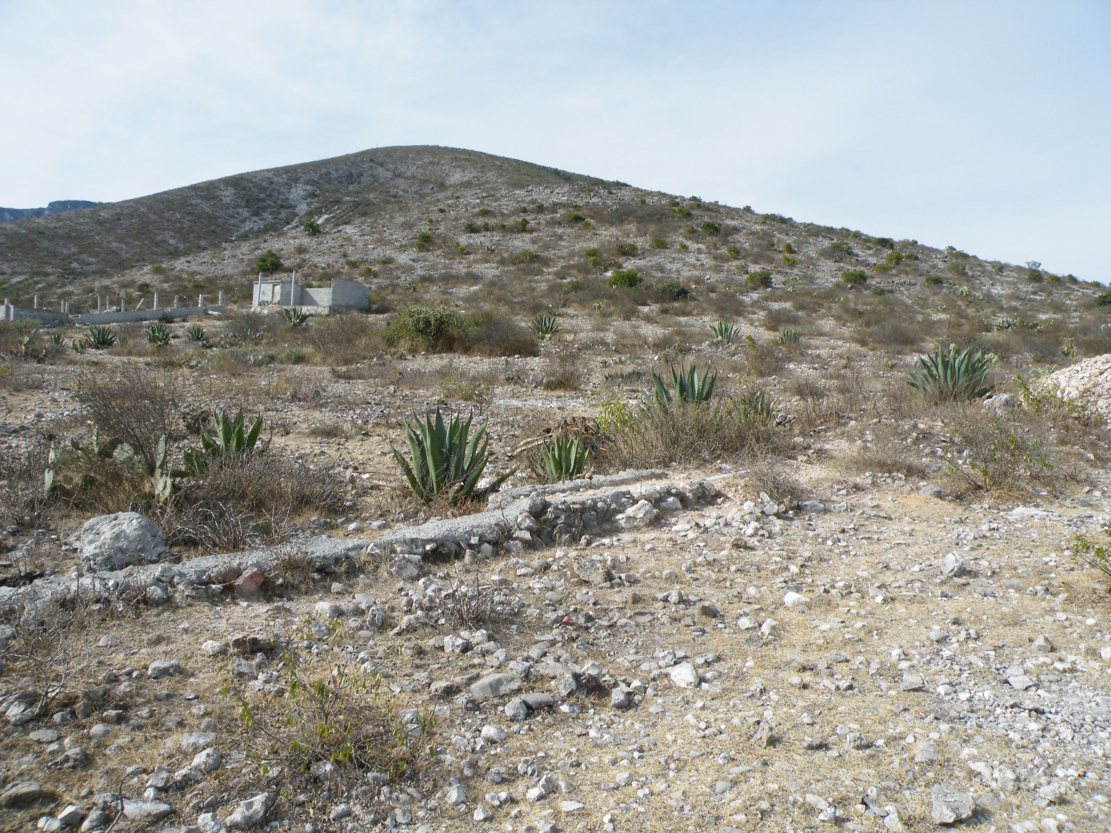 Tuxagni near Lagunilla, Hidalgo